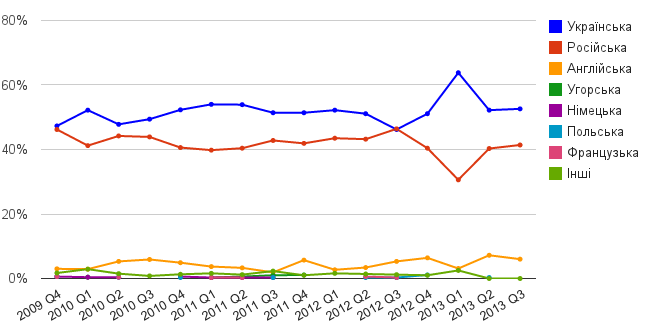 Редагування розділів вікіпедії з України. Поквартально.